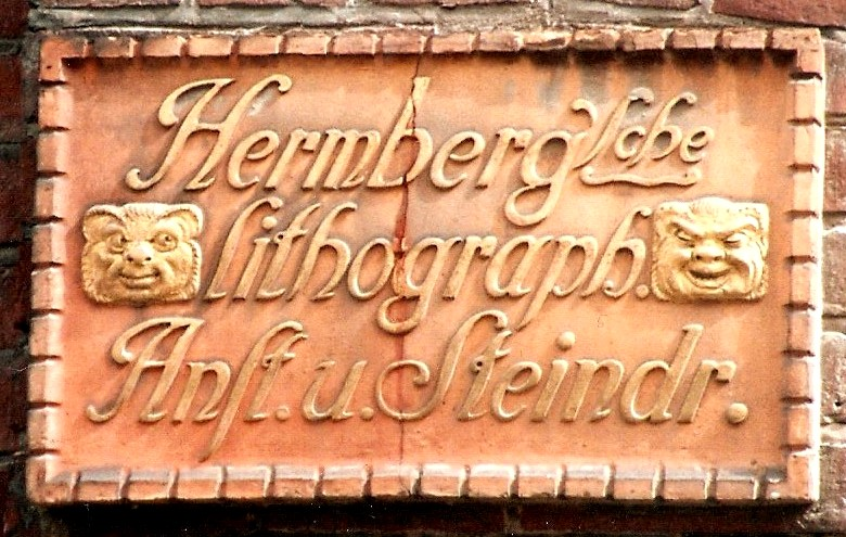 Linksseitiges Schild, Hermbergsches Haus (Detail)